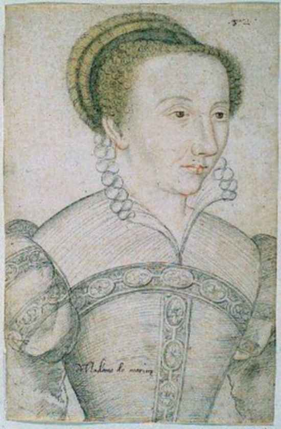 Joanna di Savoia-Nemours (1532-1568) 2.Ehefrau Nicholas de Lorraine, Duc de Mercoeur (1524-1577)